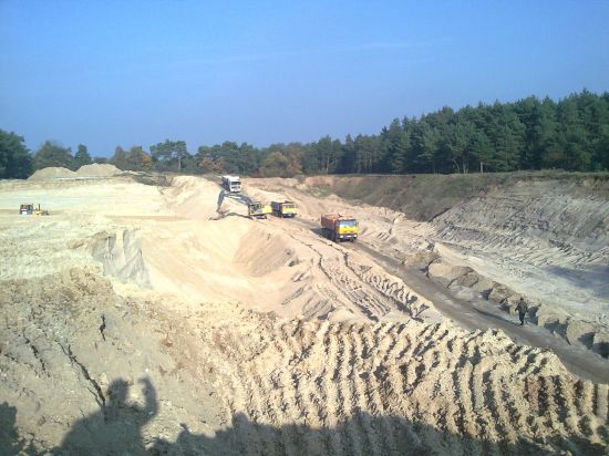 Żwirownia Makowiska IIA